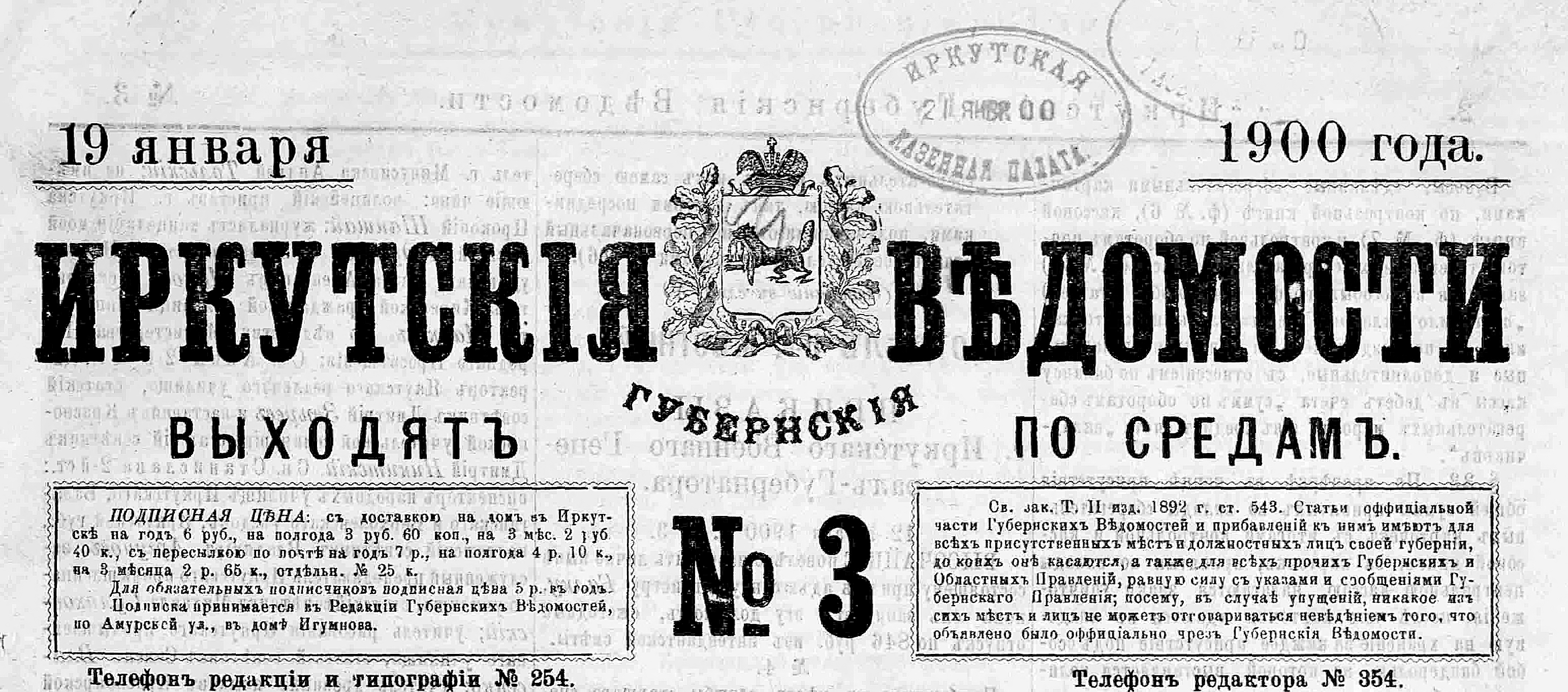 Иркутские губернские ведомости